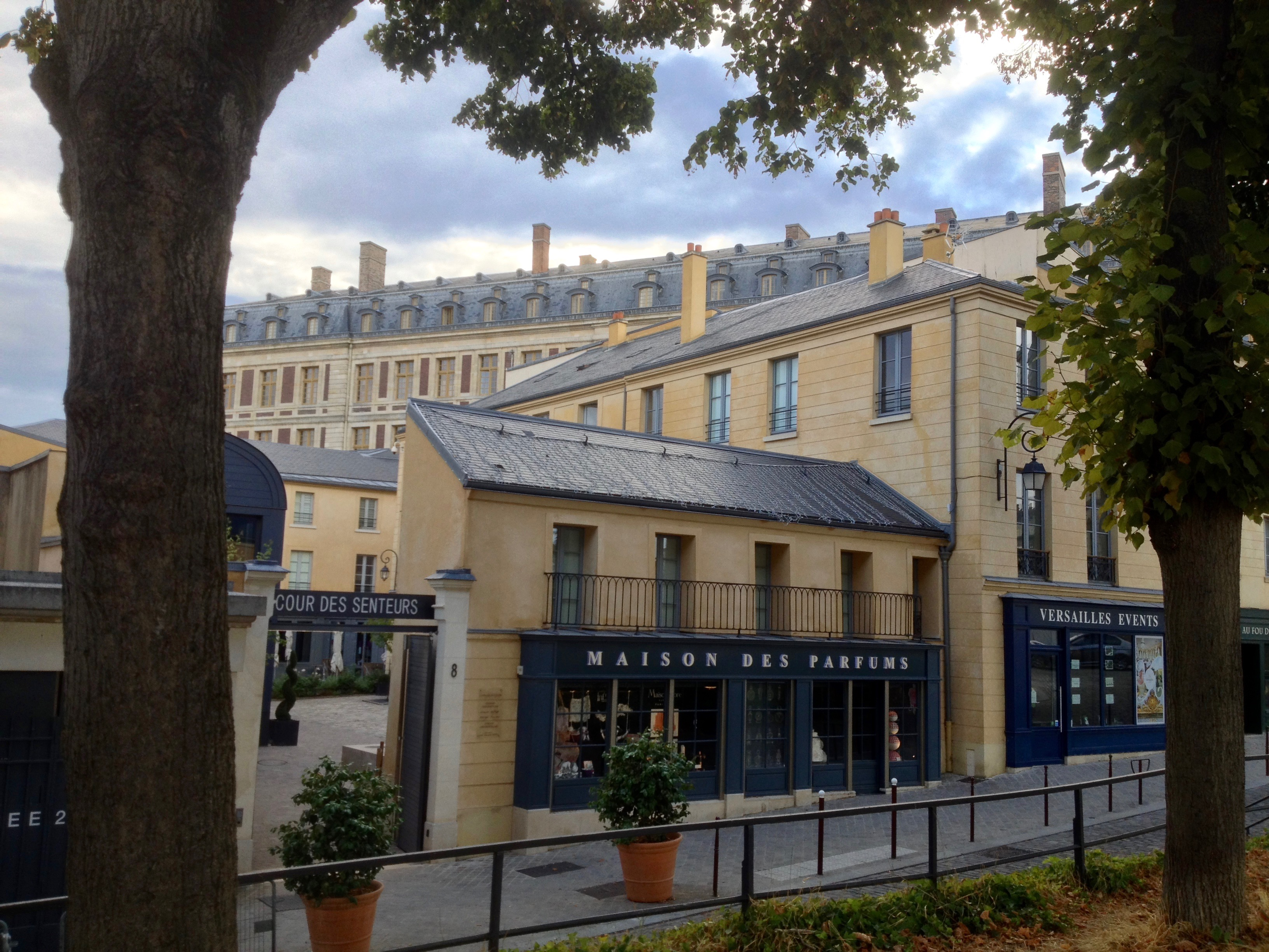 l'immeuble situé au 8 rue de la Chancellerie, Versailles, a été réhabilité et inauguré en 2013 comme Maison des Parfums à la Cour des Senteurs. .